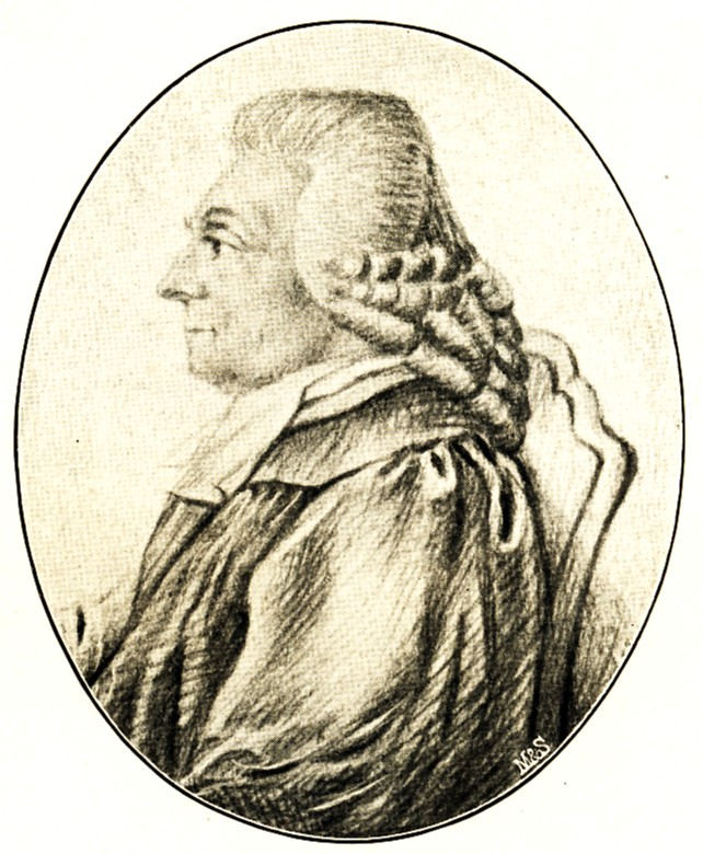 Portrait des protestantischen Theologen Johann Friedrich Wilhelm Jerusalem, genannt Abt Jerusalem.